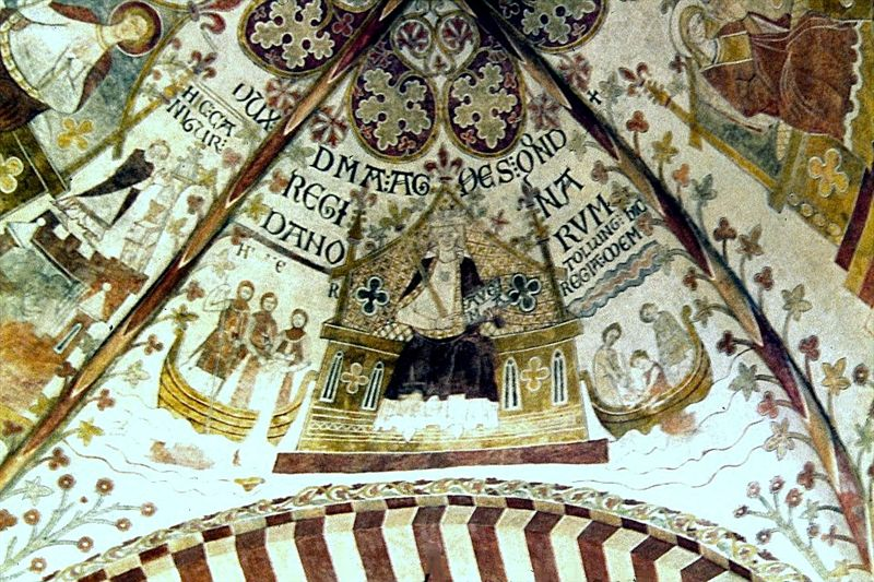 Ringsted Sankt Bendts Kirke i Danmark. Korsskæringens kalkmalerier. Dronning Agnes